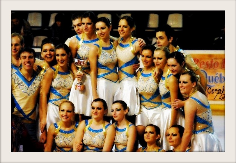 Les Atlantides Trophée d'Aquitaine janvier 2012 Bordeaux France